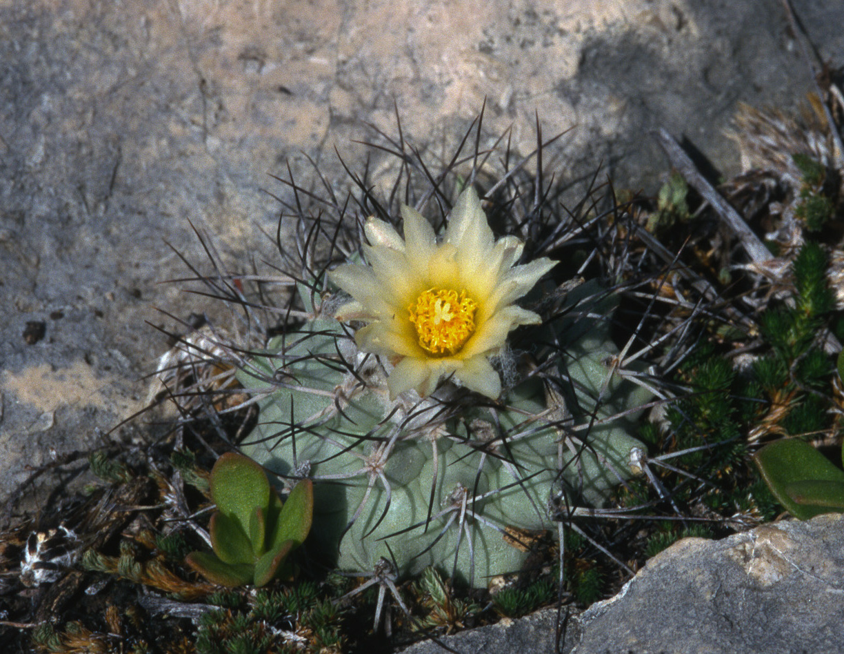 Turbinicarpus gielsdorfianus aus dem mexikanischen Bundesstaat San Luis Potosi.